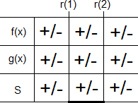 Quadro de Sinais Geral para dois fatores de uma Inequação-Produto ou Inequação-Quociente